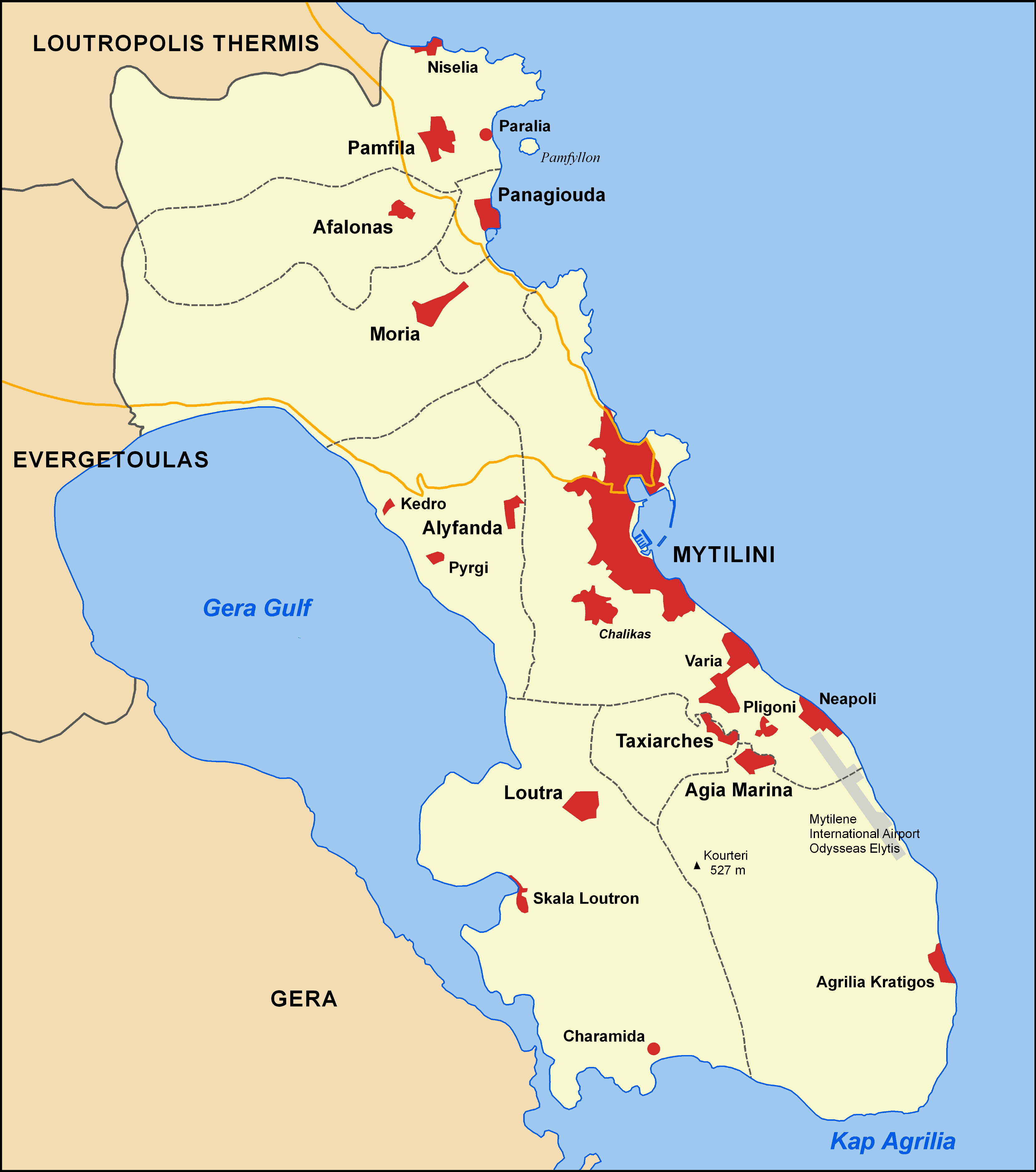 Towns in the municipality of Mytilini